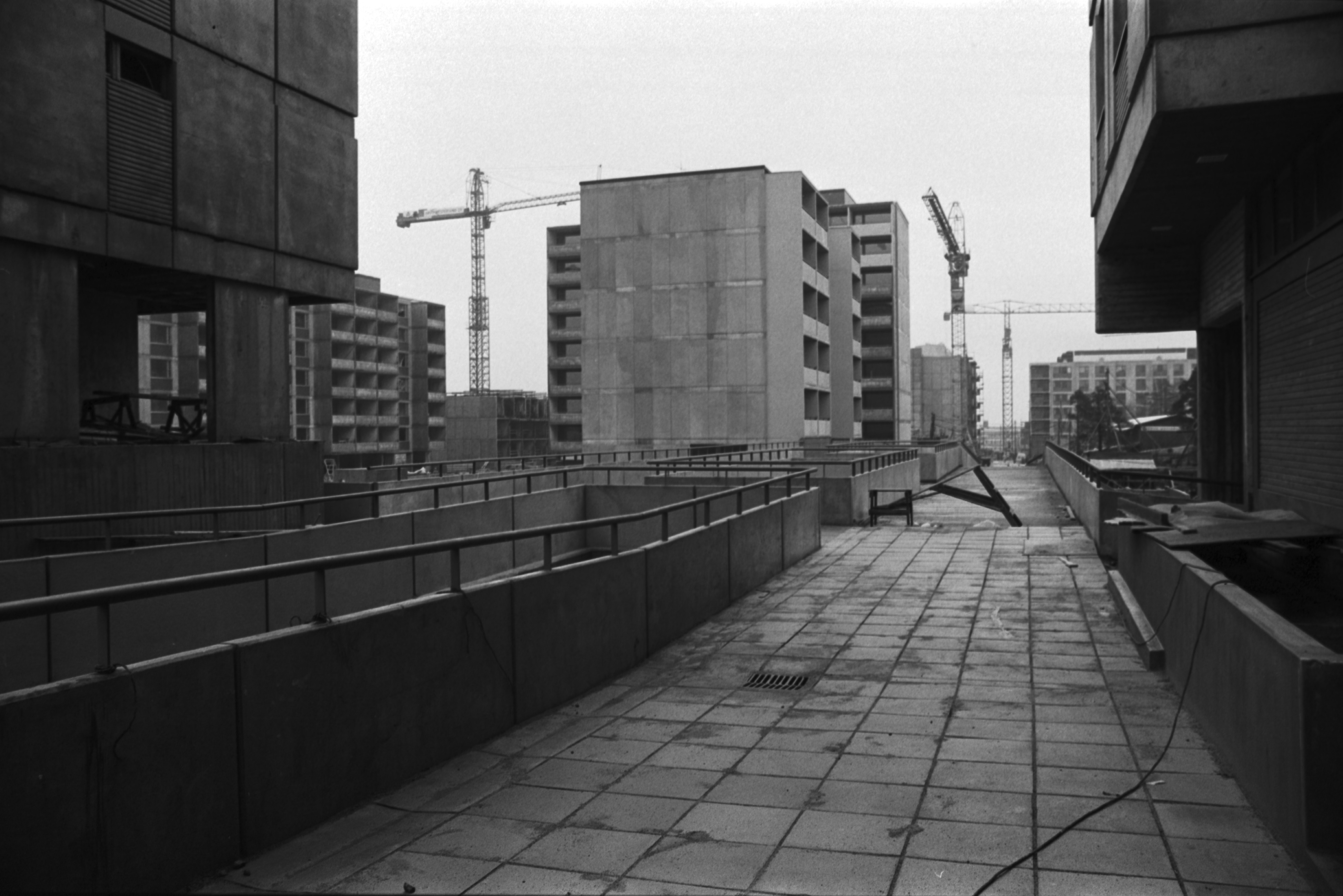 Rakenteilla olevia elementtikerrostaloja Itä-Pasilassa.